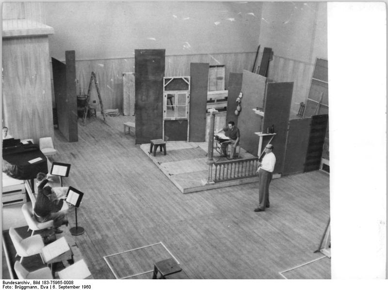 Leipzig, Opernhaus, Probebühne Zentralbild Brüggmann 6.9.1960 Neue Oper Leipzig - Eines der modernsten Bühnenhäuser Eines der modernsten Bühnenhäuser Europas ist die neue Leipziger Oper, die am 8. Oktober ihre erste Premiere mit Ludwig van Beethovens "Fidelio" erlebte. Etwa 8400 Bauarbeiter und Werktätige schufen die neue Oper, in der jedem der 1700 Zuschauer beste Sicht- und Hörverhältnisse geboten werden. Hervorzuheben ist die ausgezeichnete Akustik. Das Opernhaus hat die günstige Nachhallzeit von 1,6 Sekunden bei ausgeglichener Nachhallkurve und sehr guter Sprachverständlichkeit. Die Spielbühne des neuen Hauses is mit 900² die größte der Deutschen Demokratischen Republik. Die eingebaute Drehbühne, die 18 Meter im Durchmesser mißt, ist kombiniert mit einer hinteren und zwei seitlichen Schiebebühnen, die eine schnelle Verwandlung des Bühnenbildes ermöglichen. UBz: Neben der großen Hauptbühne besitzt das neue Opernhaus eine moderne Probebühne